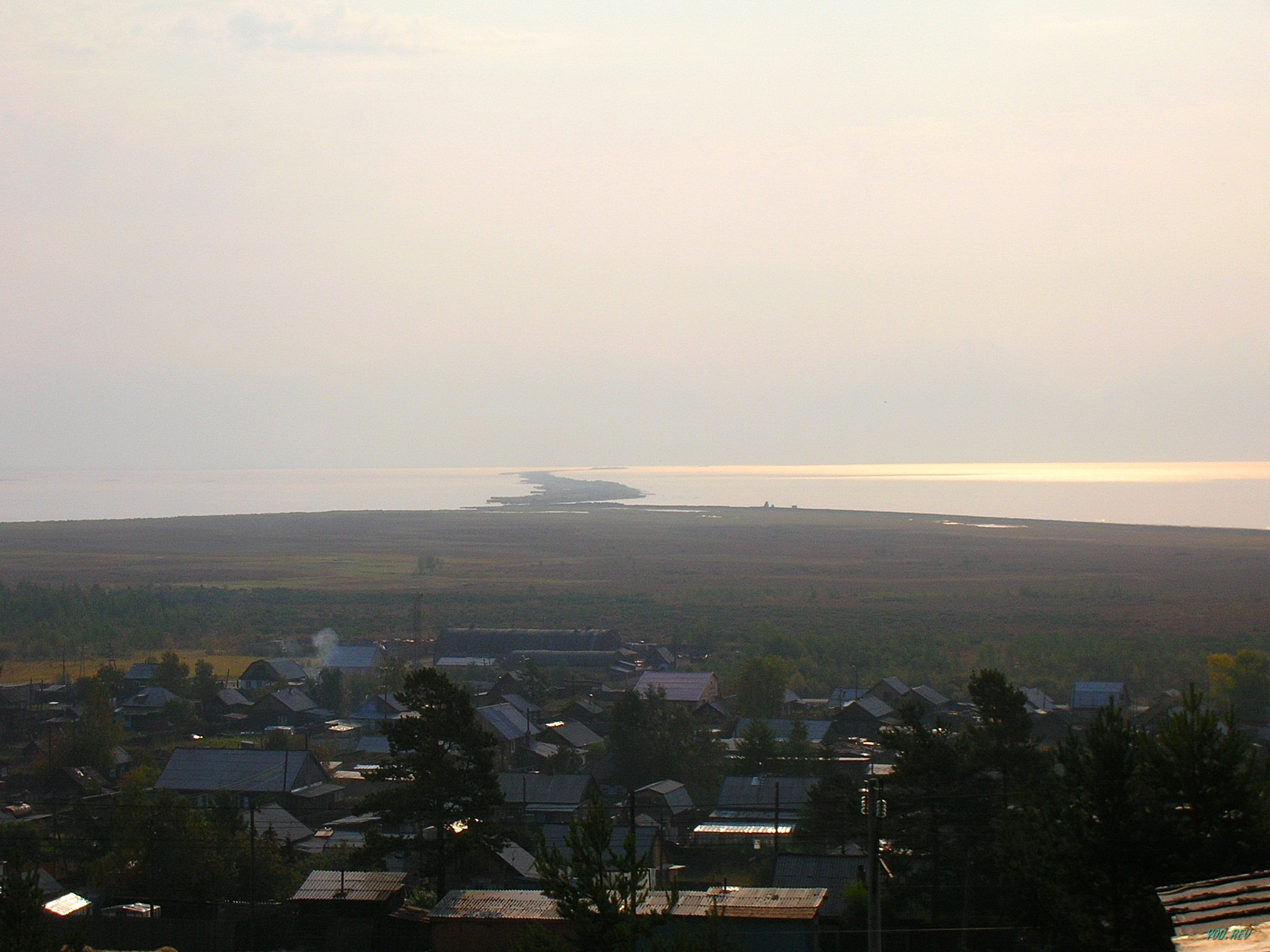 Остров Ярки